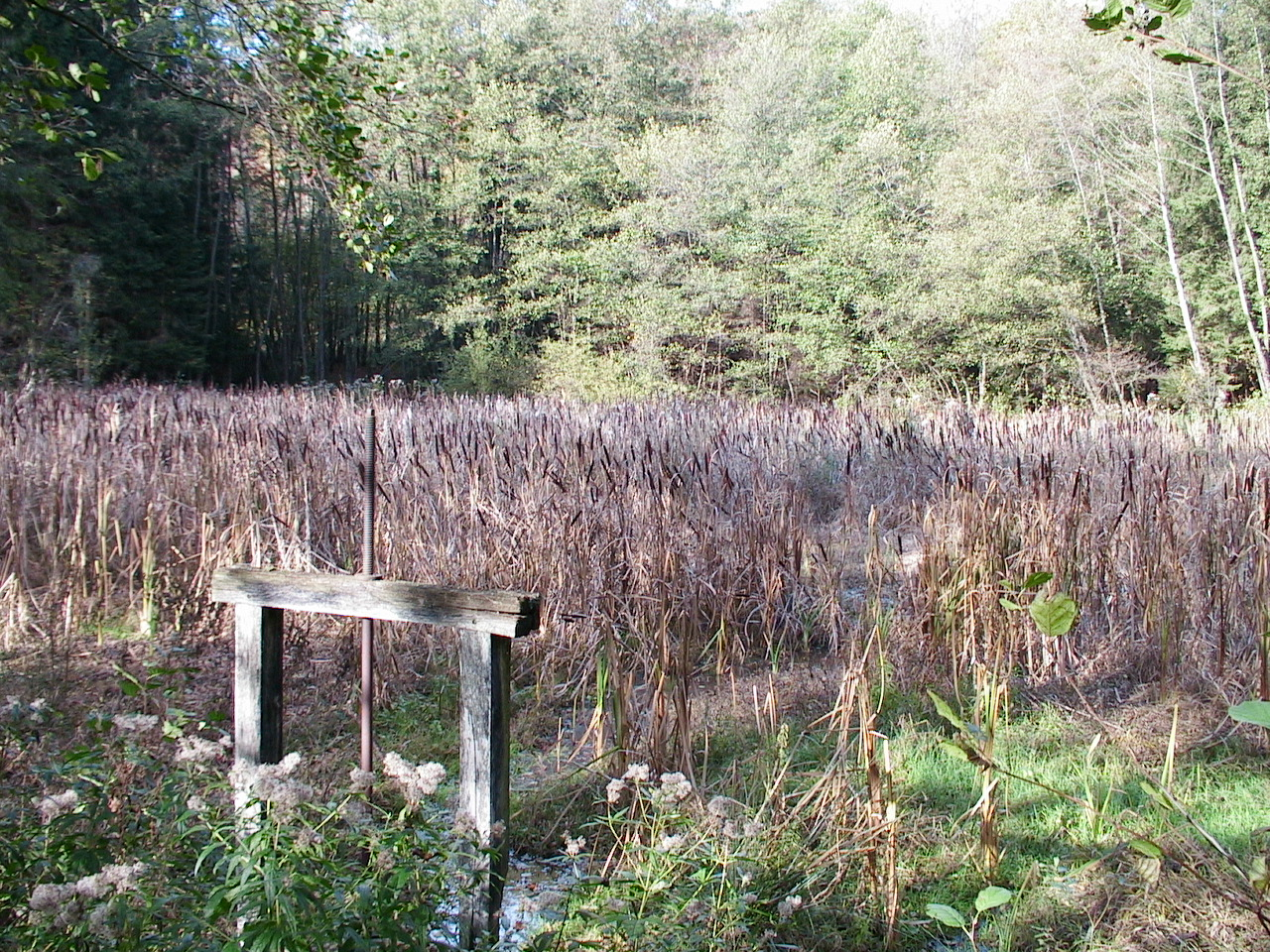 Etang envahi par les roseaux Photo prise par F5ZV en automne 2005 à Romagny-sous-Rougemont (90)